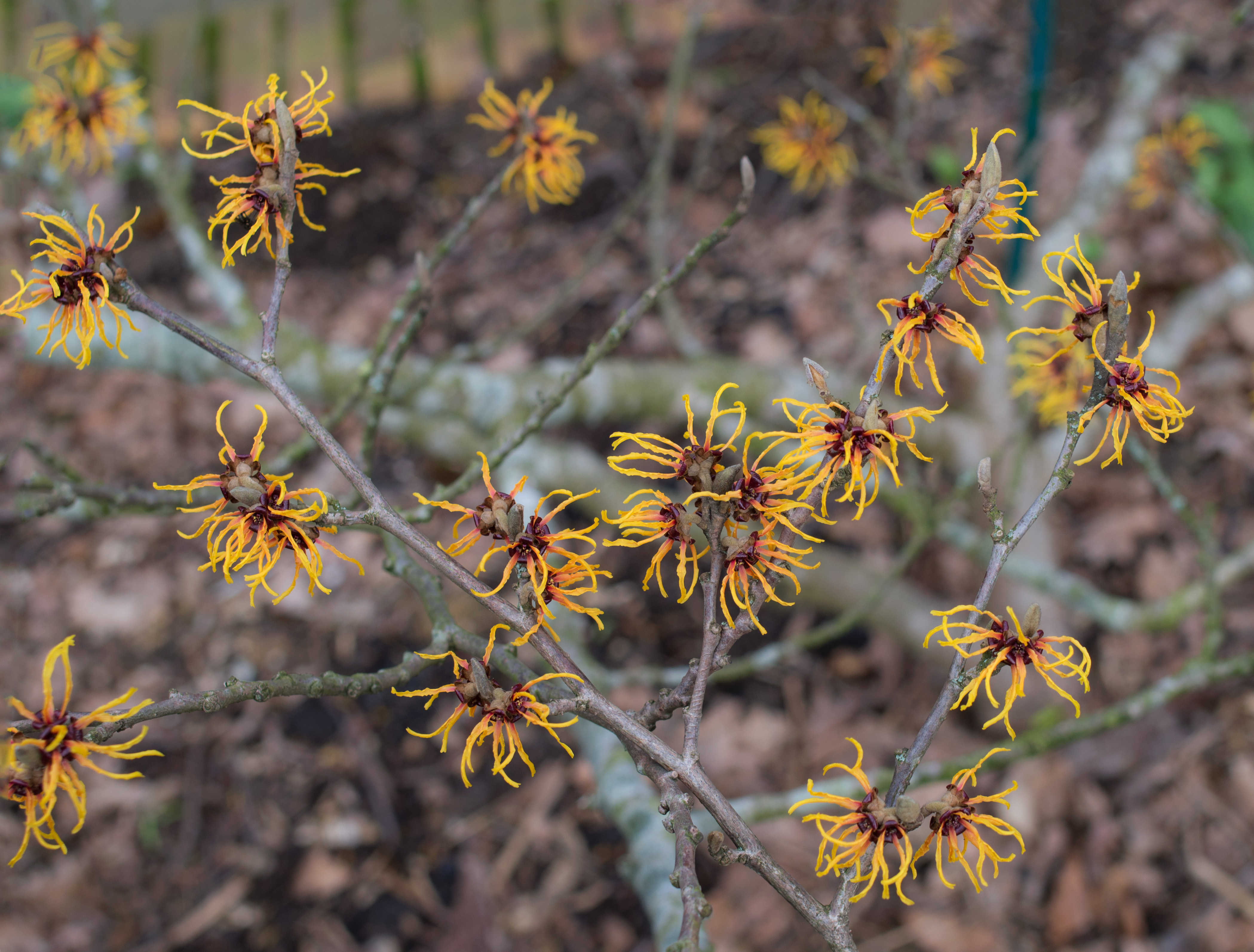 Hamamelis mollis - Parc Floral